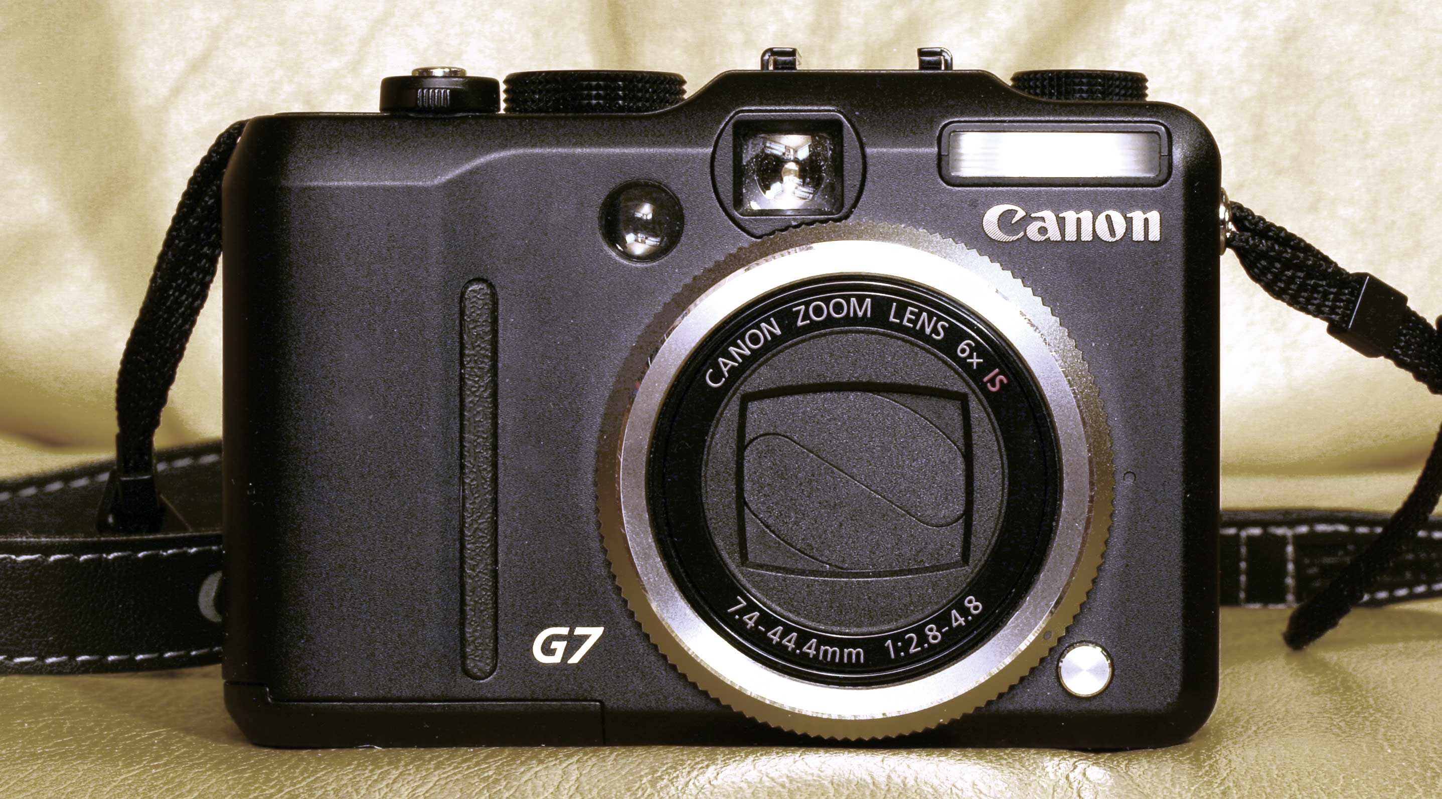 Canon G7